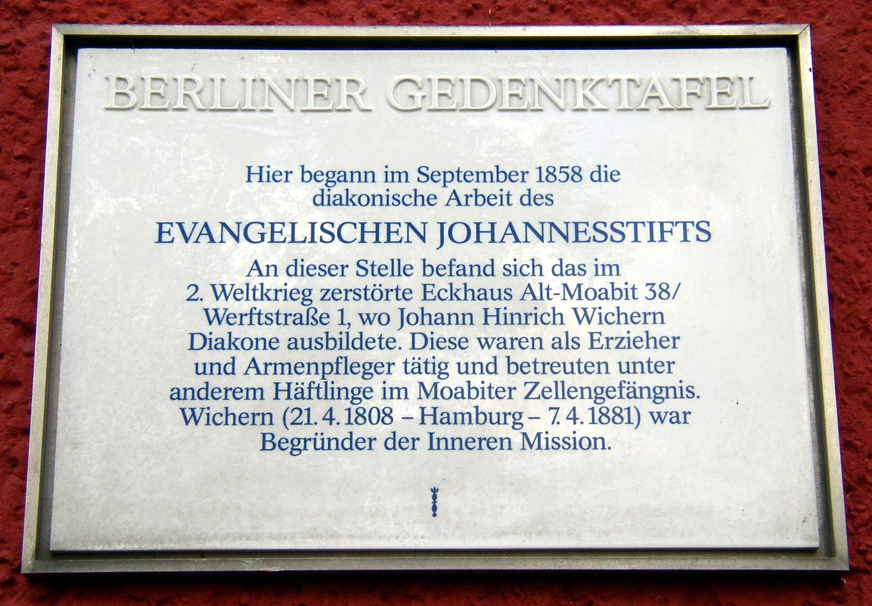 Berliner Gedenktafel für das Evangelische Johannesstift und Johann Hinrich Wichern in Berlin-Moabit, Deutschland